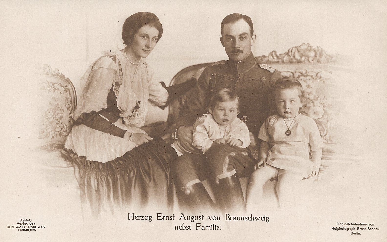 Herzog Ernst August von Braunschweig nebst Familie, 1916